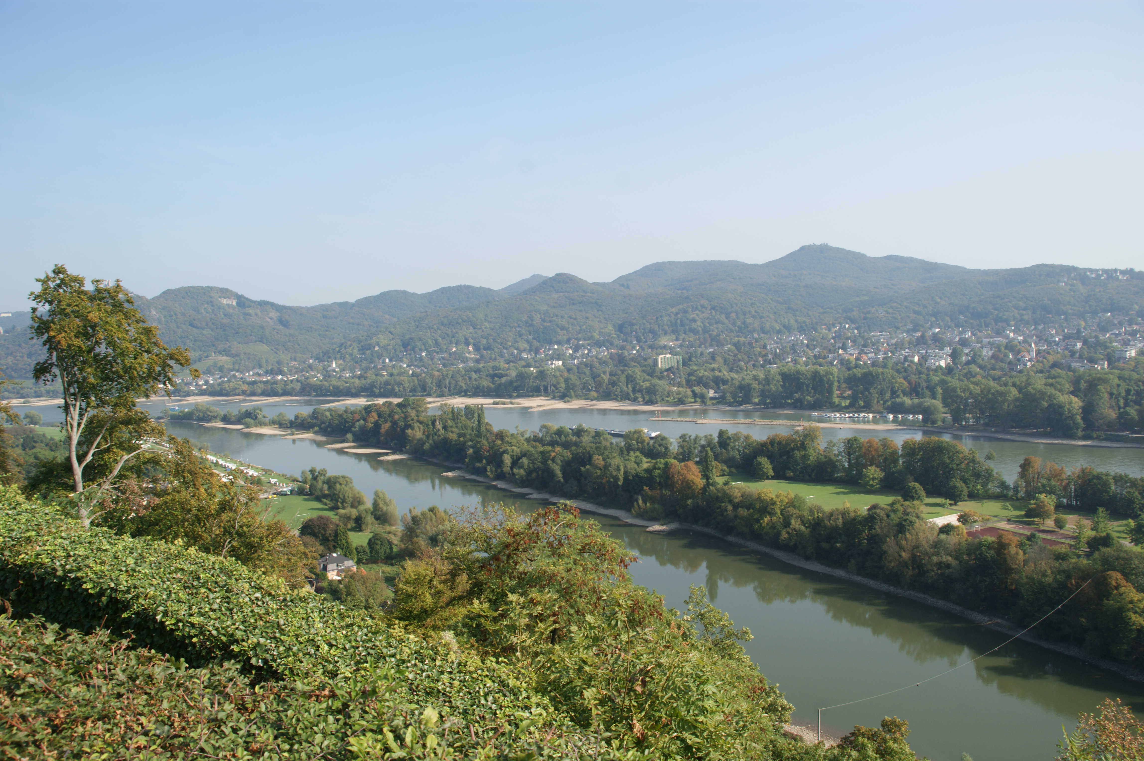 Nordende der Insel Nonnenwerth vom Rolandsbogen aus gesehen